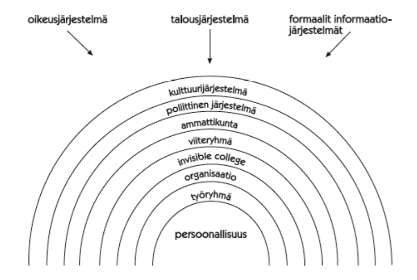 Paisleyn malli